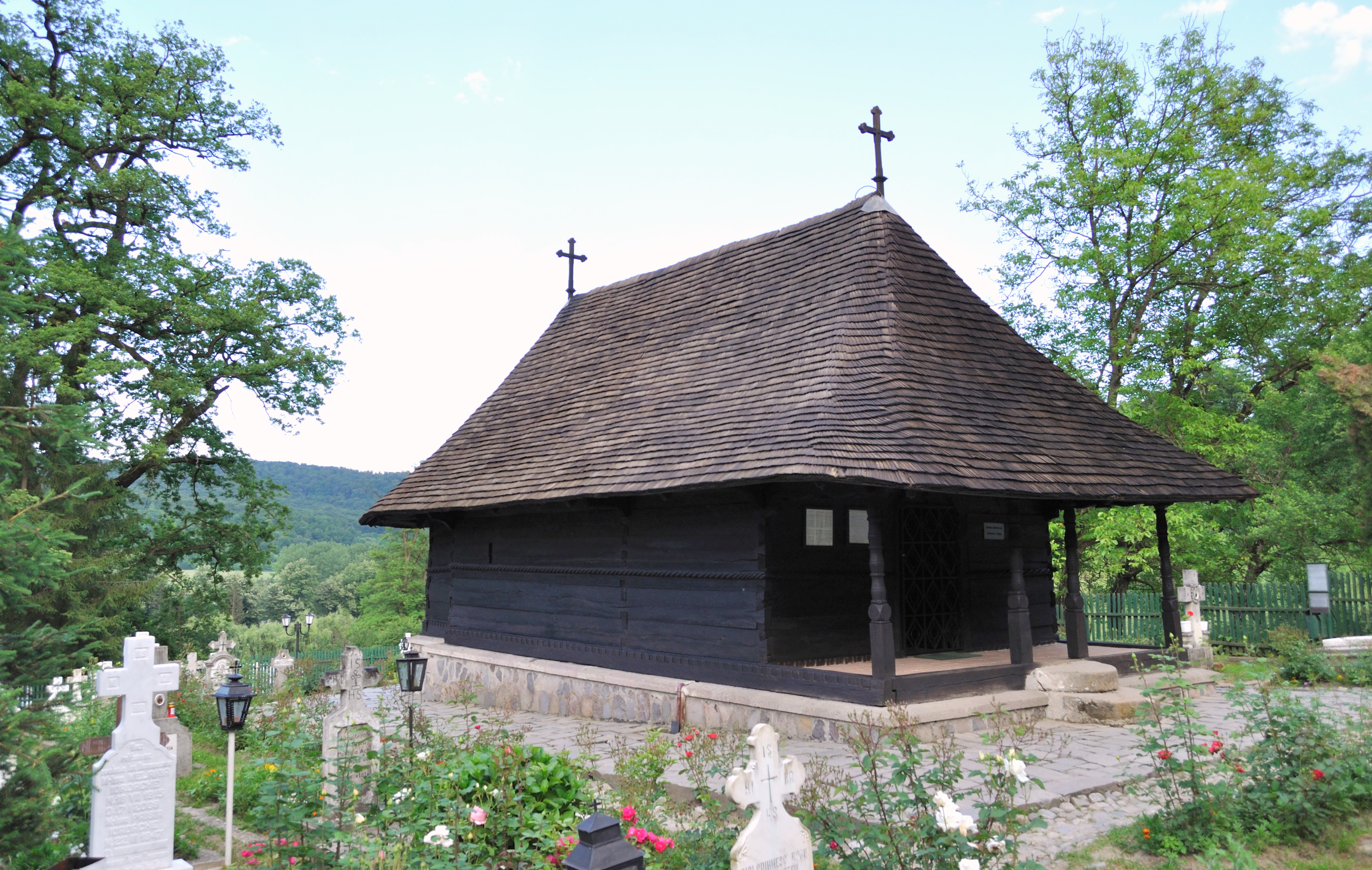 Mănăstirea dintr-un lemn, Frâncești, Vâlcea